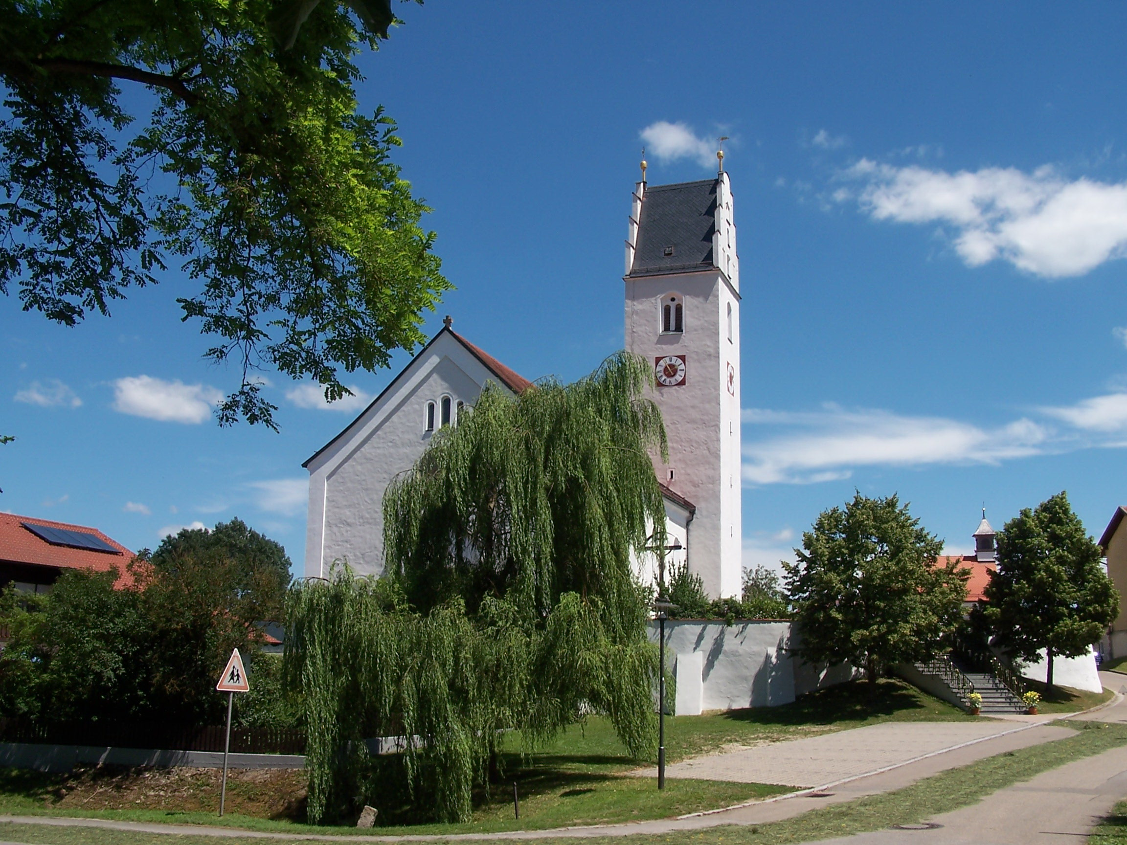 Mintraching, Moosham. Katholische Pfarrkirche St. Petrus und Klemens, Saalbau mit eingezogenem Chor, Flankenturm mit Treppengiebel und Putzgliederungen.